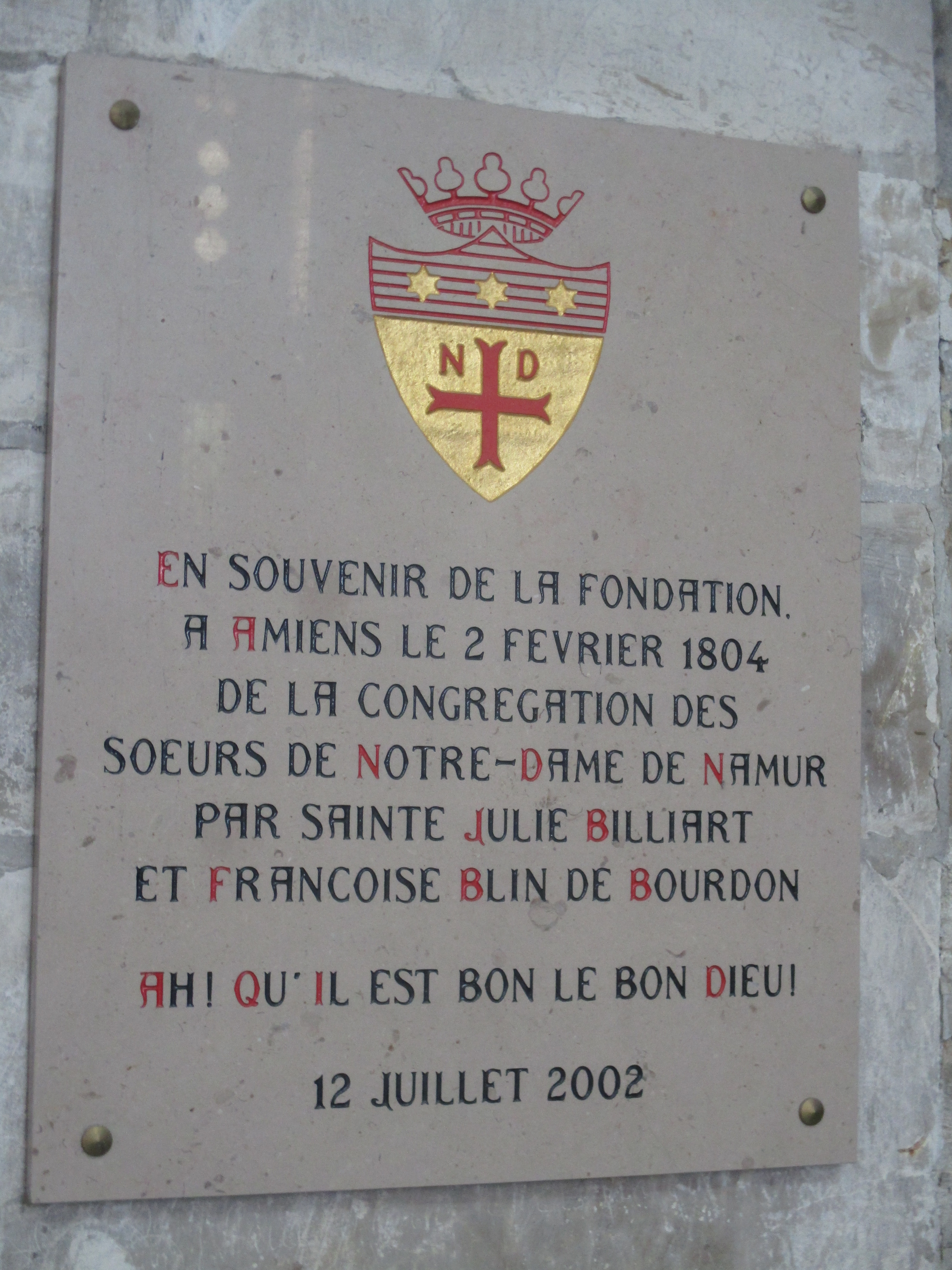 Plaque en l'honneur de la fondation des Sœurs de Notre-Dame de Namur par sainte Julie Billiart.